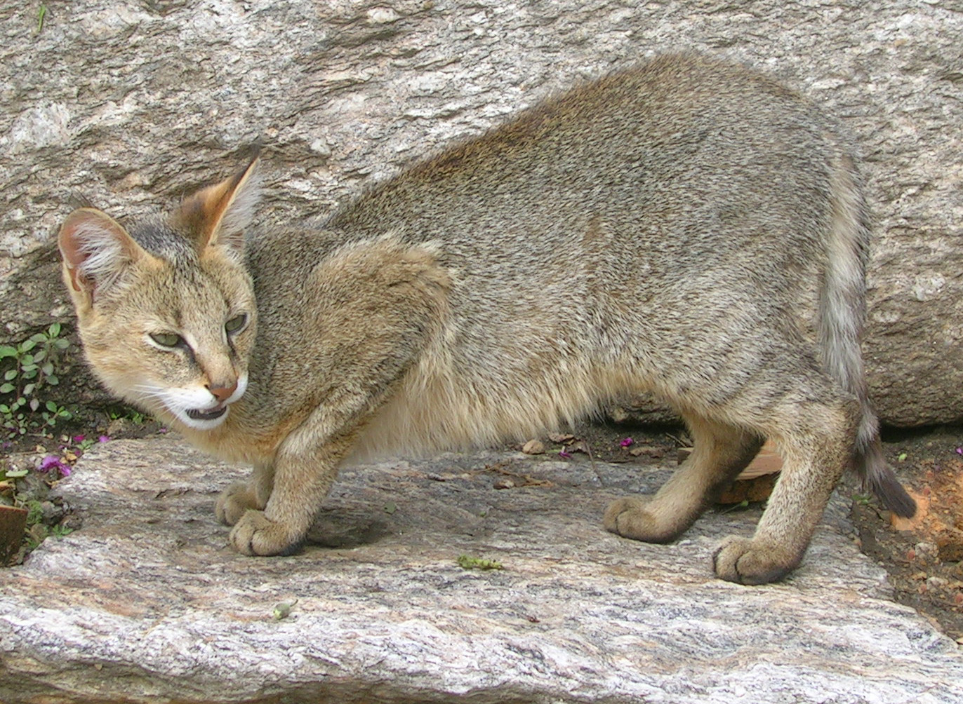 Felis chaus from Munsiyari, Uttarakhand, India